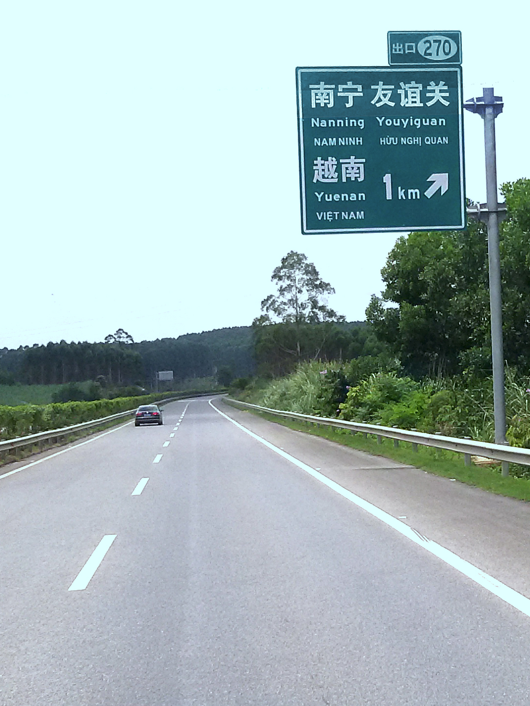 粵語: 喺合那高速嘅元井站附近，嗰度提示话可以转南友高速。